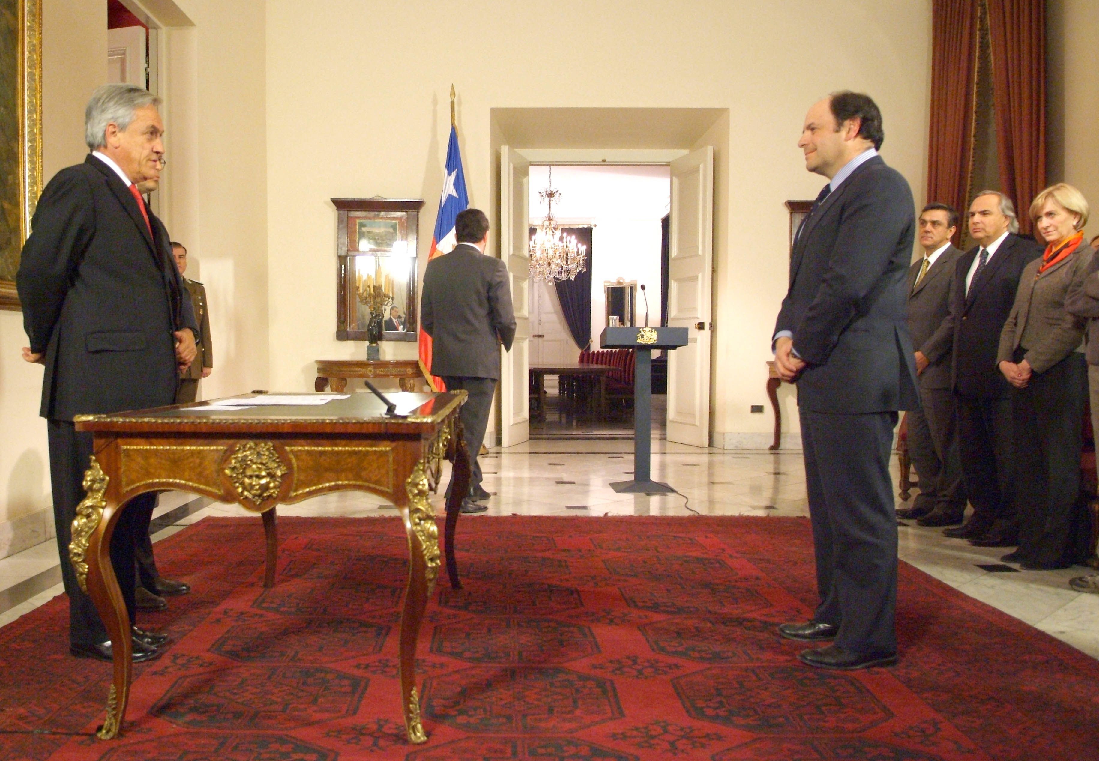 Juramento nuevo Ministro de Energía,Rodrigo Álvarez Zenteno.Palacio de La Moneda.